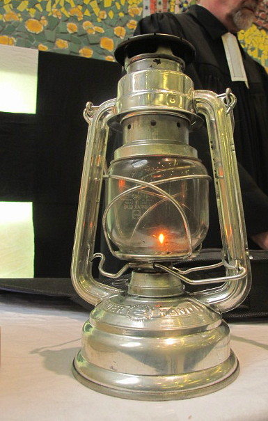 Friedenslicht von Bethlehem